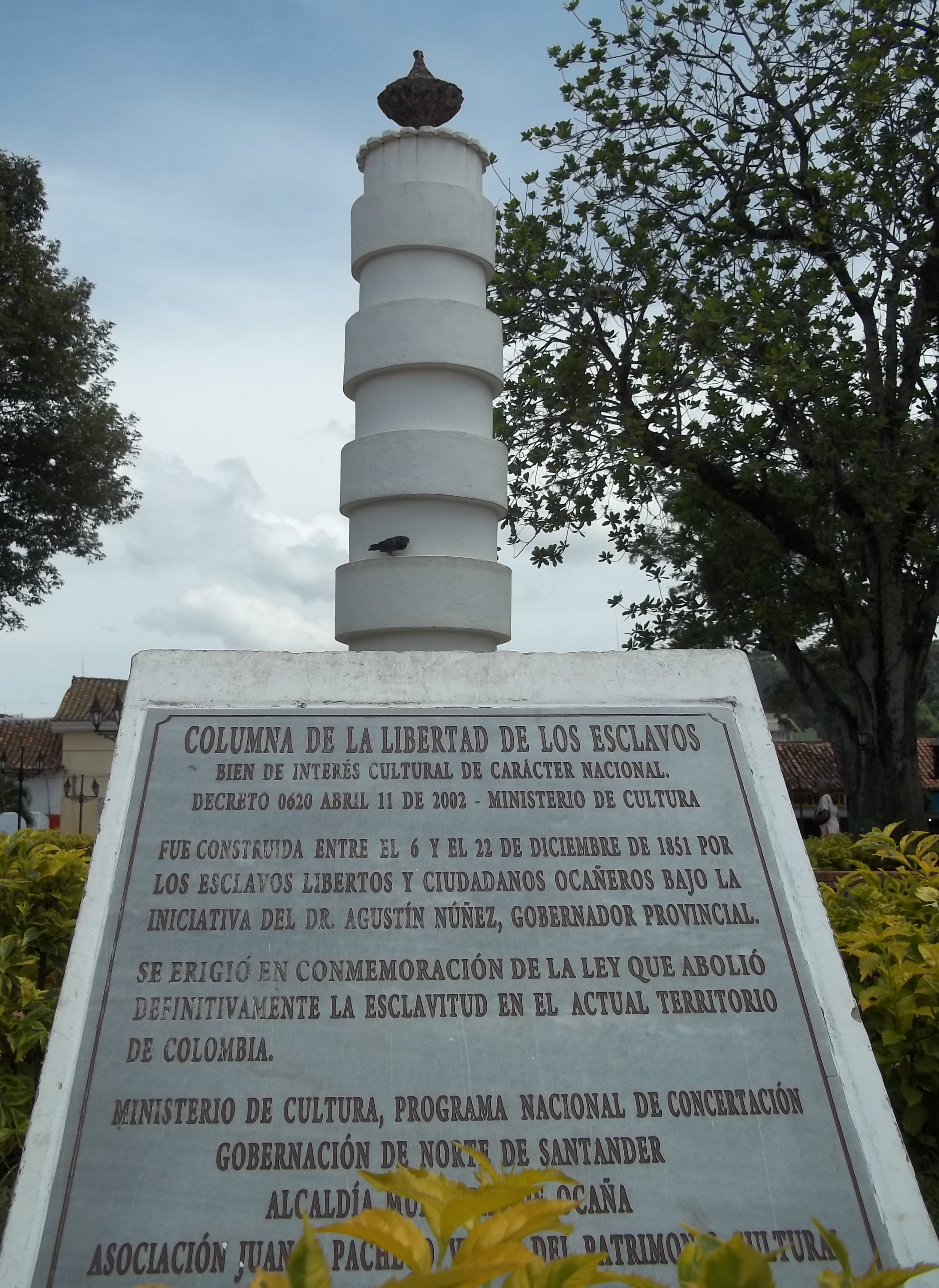 Los fieles inquilinos de la columna de los esclavos, que han visto la historia de este monumento.